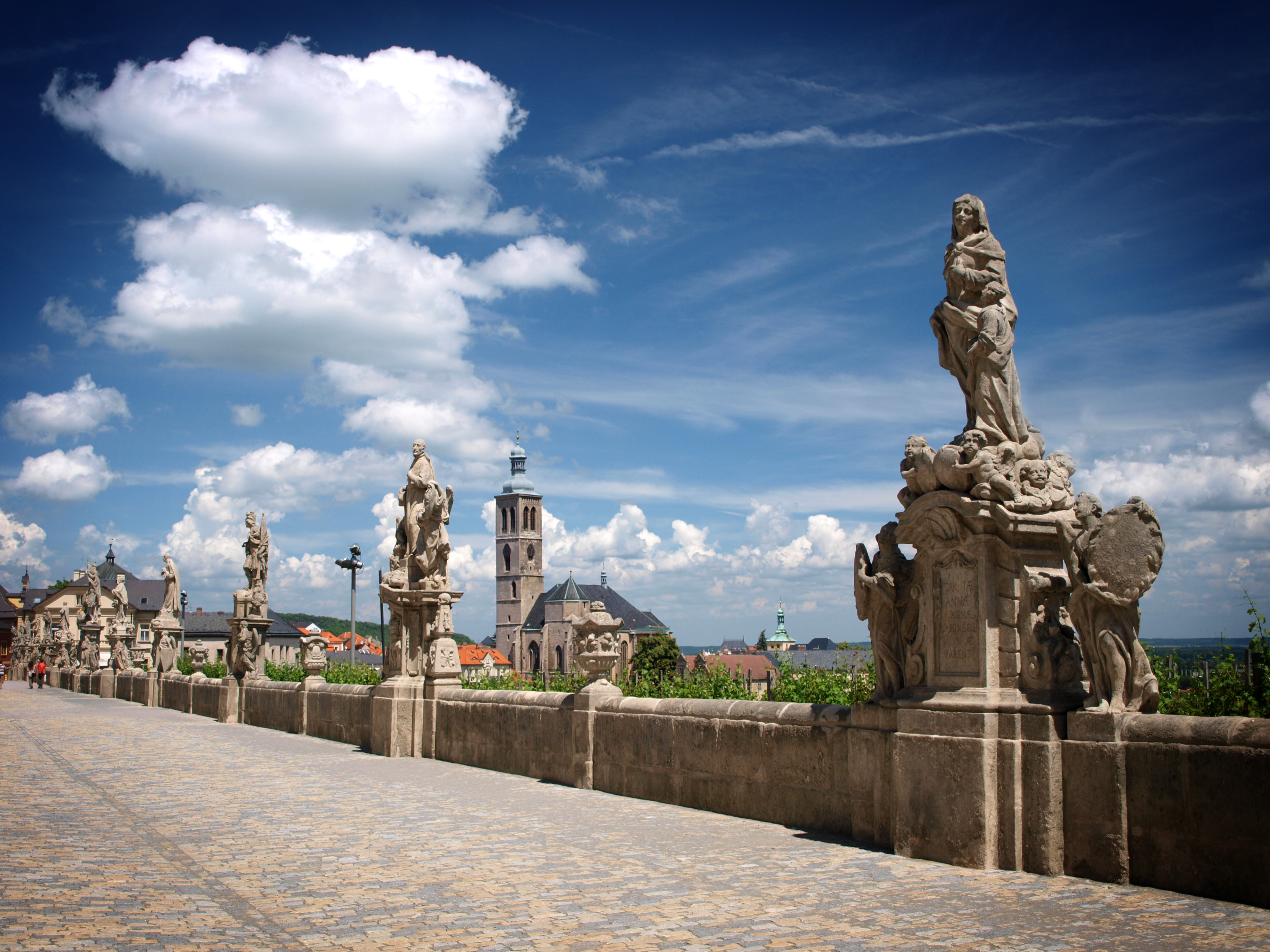 Kostel sv. Jakuba pohled od Jezuitských kolejí, Kutná Hora Číslo rejstříku ÚSKP: 31957/2-1043